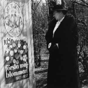 Förstamajblomman firar 30 år. Bild på Beda Hallberg 1937.